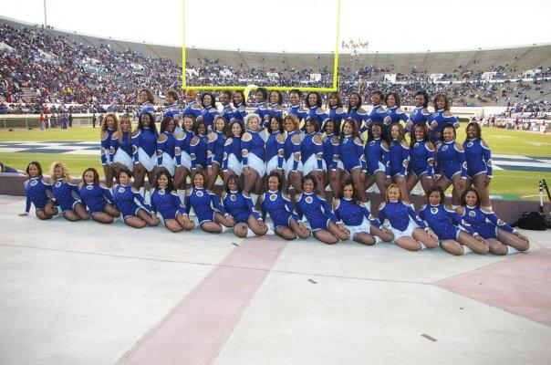 jackson nstate cheerleaders